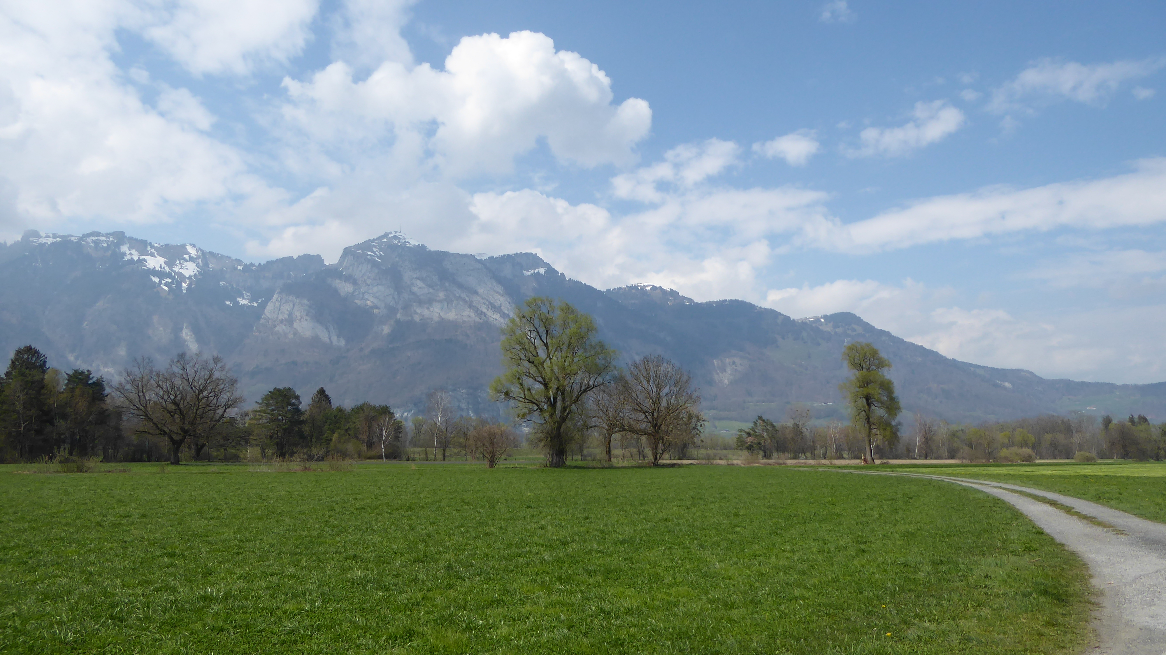 Schneggenäule, Ruggell; im Hintergrund Hoher Kasten